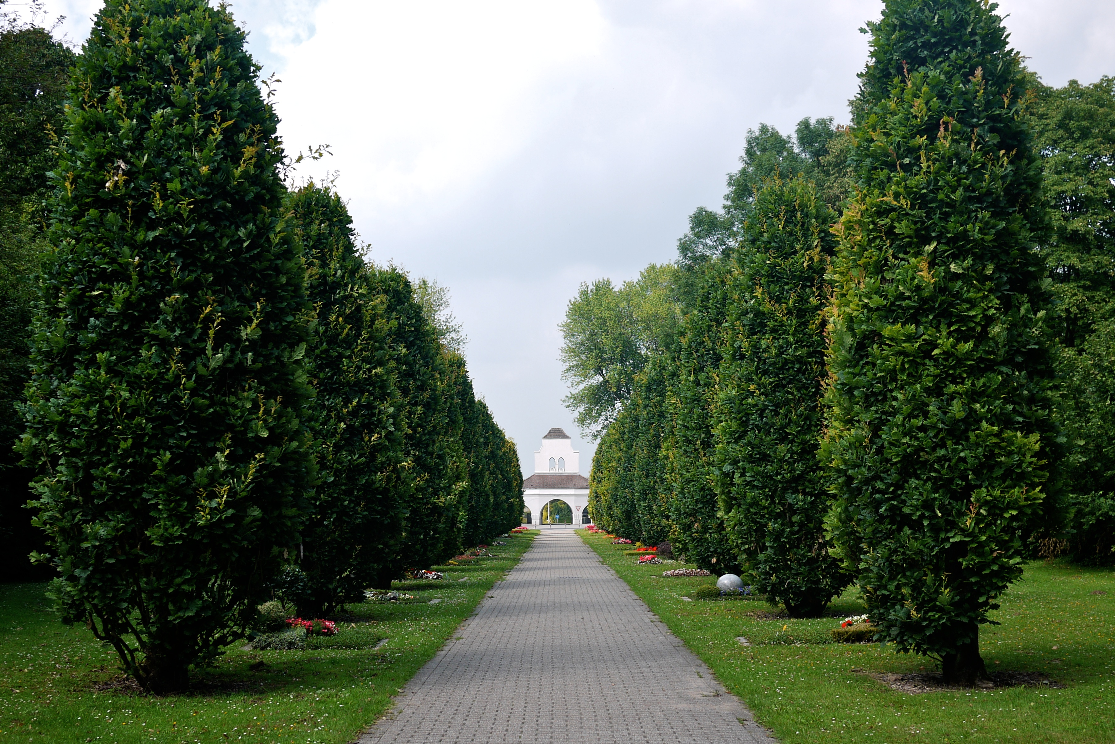 Haupttfriedhof in Mülheim an der Ruhr, Blick entlang der Hauptachse zum denkmalgeschützten Portal